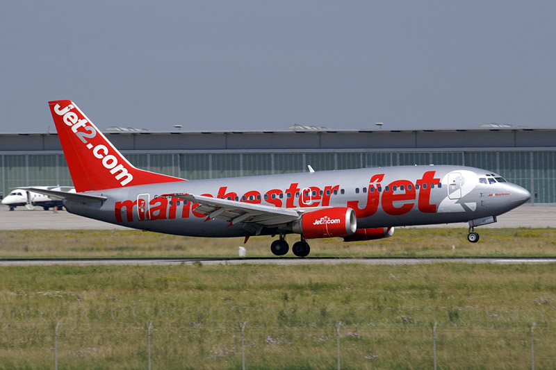 Jet 2 Boeing 737-300 G-CELI